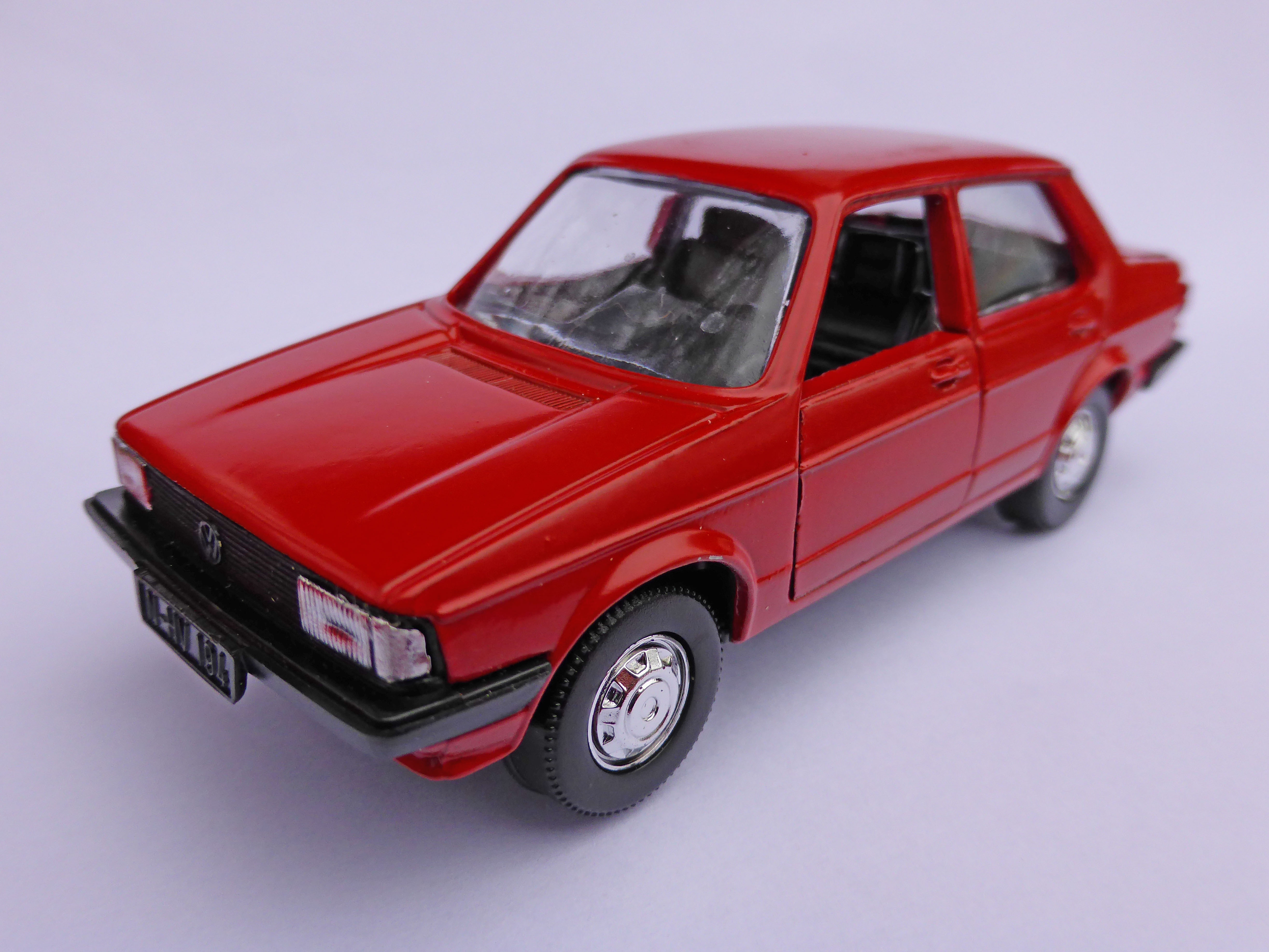 Modellauto VW Jetta (1. Generation) von Schabak